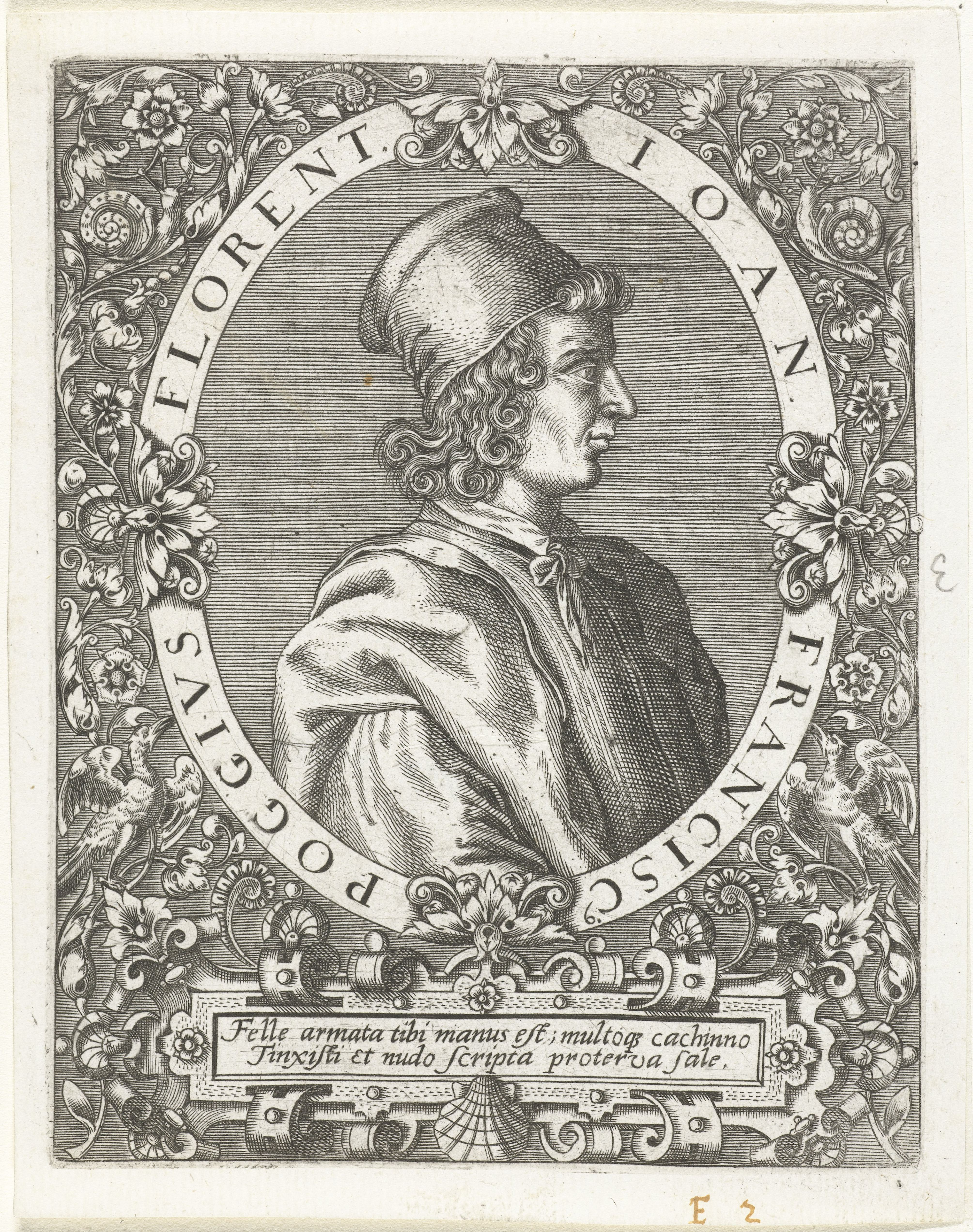 IdentificatieTitel(s): Portret van Poggio BraccioliniIoan Francisc[us] Poggius (titel op object)Objecttype: prent boekillustratie Objectnummer: RP-P-1909-4349Catalogusreferentie: Singer 73228Opschriften / Merken: verzamelaarsmerk, verso, gestempeld: Lugt 2228Omschrijving: Portret van de Italiaanse humanist Gian Francesco Poggio Bracciolini, in ovaal met randschrift. Onder het portret een lofdicht.VervaardigingVervaardiger: prentmaker: Theodor de Brynaar ontwerp van: Jean Jacques Boissard (mogelijk)Plaats vervaardiging: Frankfurt am MainDatering: ca. 1597 - ca. 1599Fysieke kenmerken: gravureMateriaal: papier Techniek: graveren (drukprocedé)Afmetingen: plaatrand: h 145 mm × b 115 mmToelichtingGemaakt voor: J.J. Boissard, Icones virorum illustrium doctrina &c eruditione praestanti um contines. Frankfurt am Main: de Bry, 1597-1599.OnderwerpWie: Gian Francesco Poggio BraccioliniVerwerving en rechtenVerwerving: aankoop 1905Copyright: Publiek domein